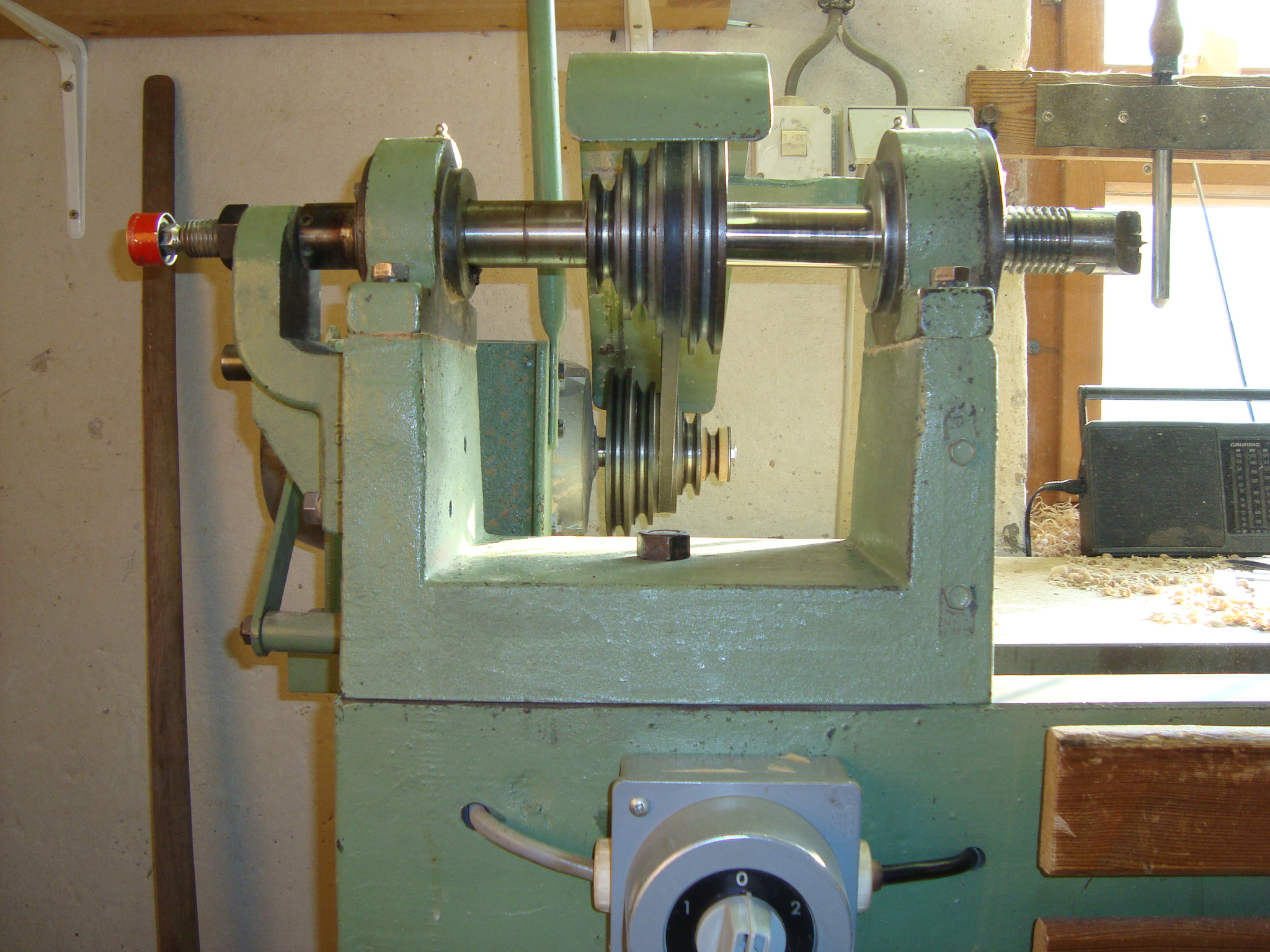 Spindelstock einer Holzdrehbank